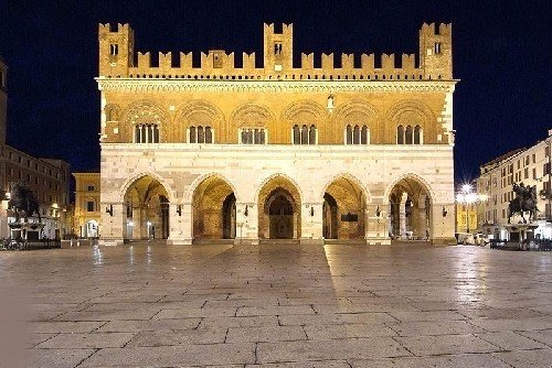 Facciata del medievale Palazzo del Comune a Piacenza (iniziato nel 1281), detto comunemente "il Gotico", nella "Piazza dei cavalli" di Piacenza, vista da Piazza Cavalli. (Fotografia di Palazzo Gotico di Alessandro Bersani)